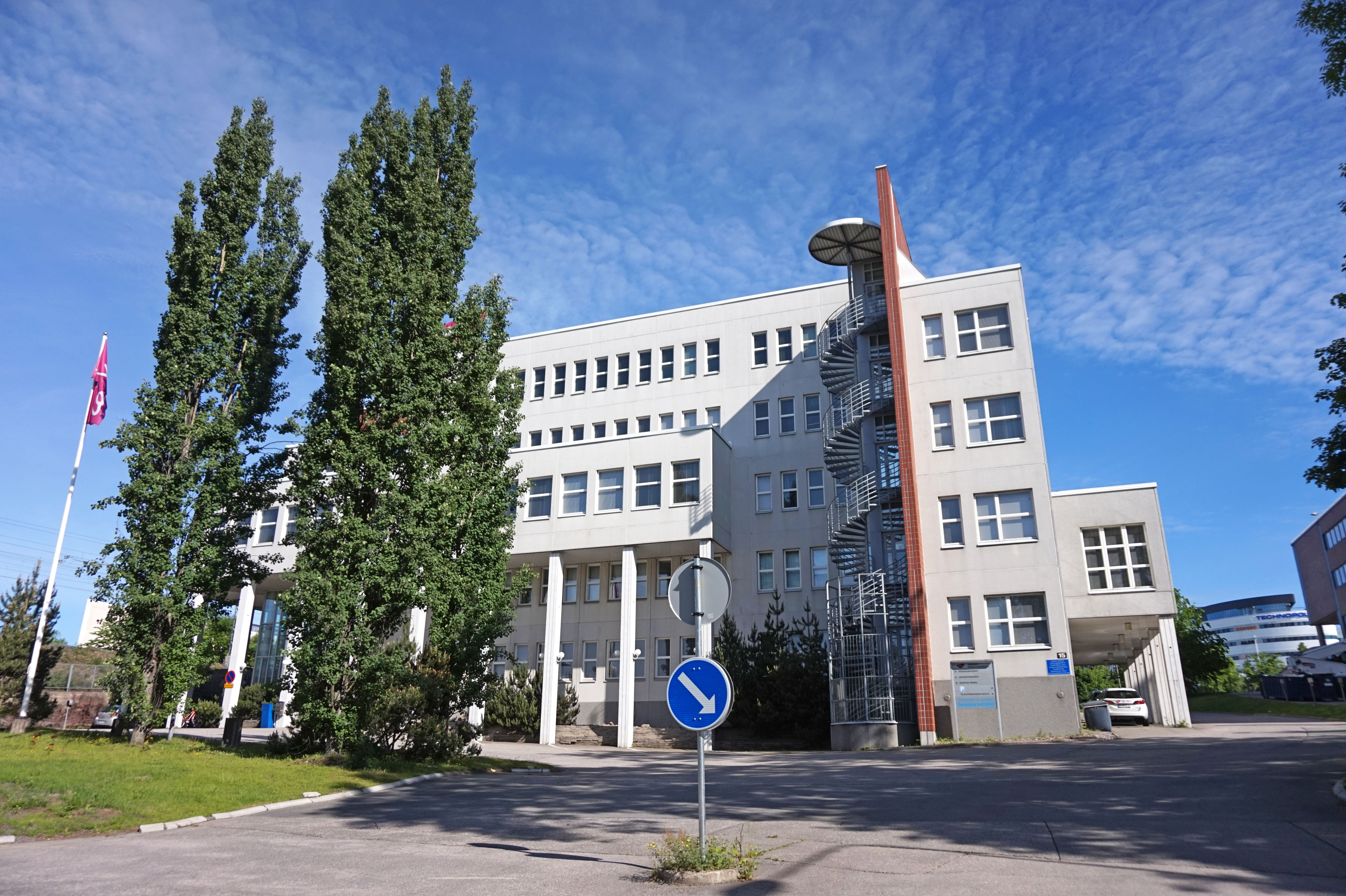 Tampereen Aikuiskoulutuskeskus.This photograph was taken with a Sony ILCE-5000